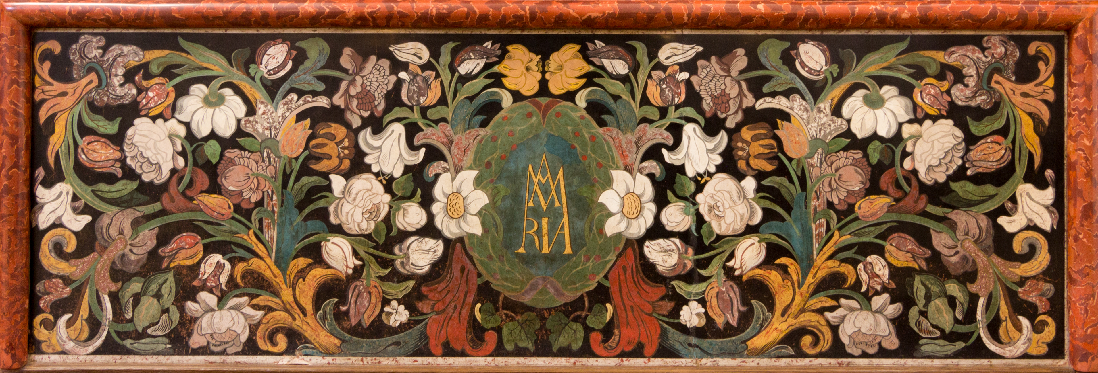 Scalgiola-Antependium im Kastulus-Altar in der Kirche St. Lorenz Kempten